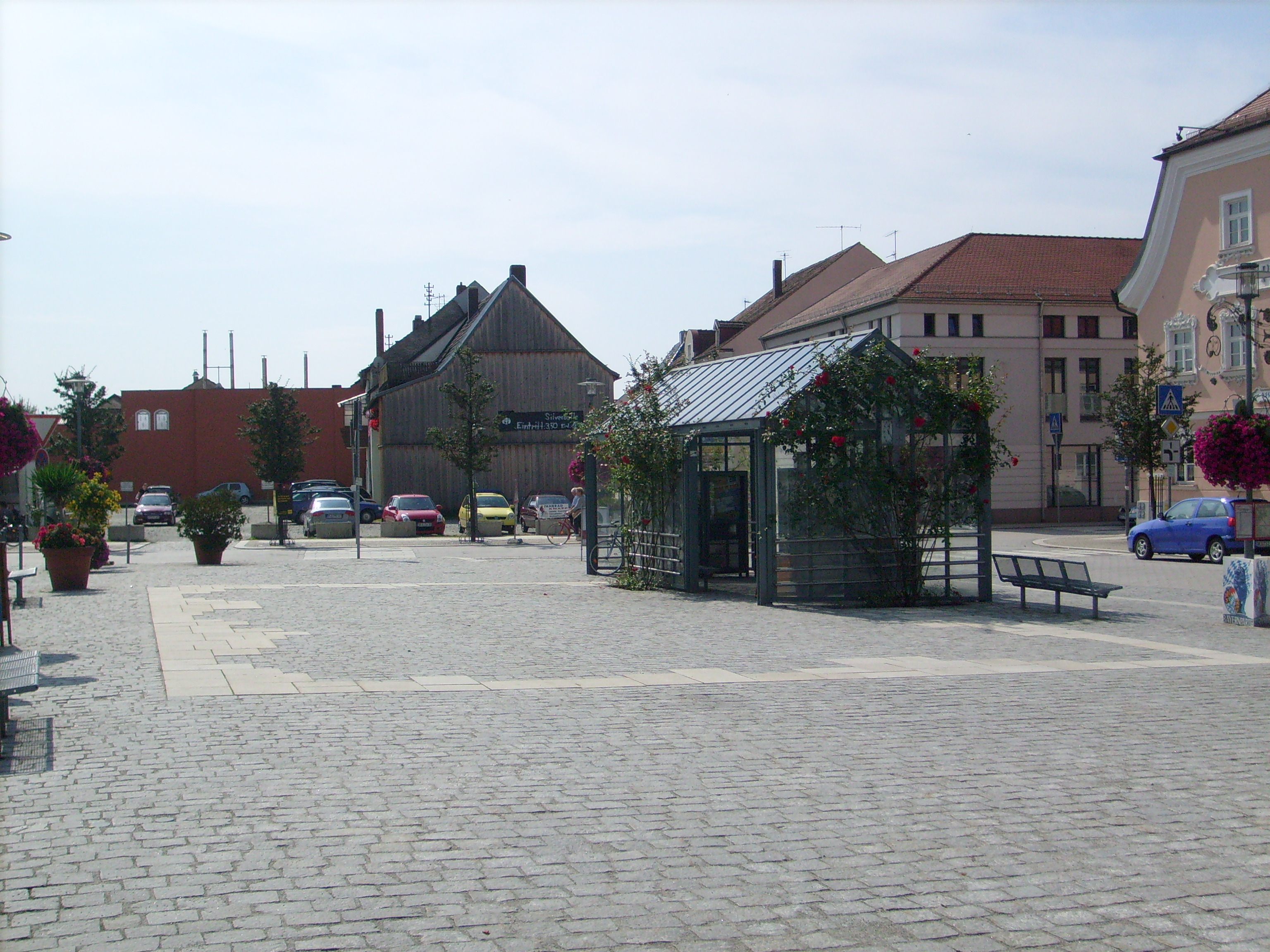 Der Hengersberger Marktplatz in Niederbayern.